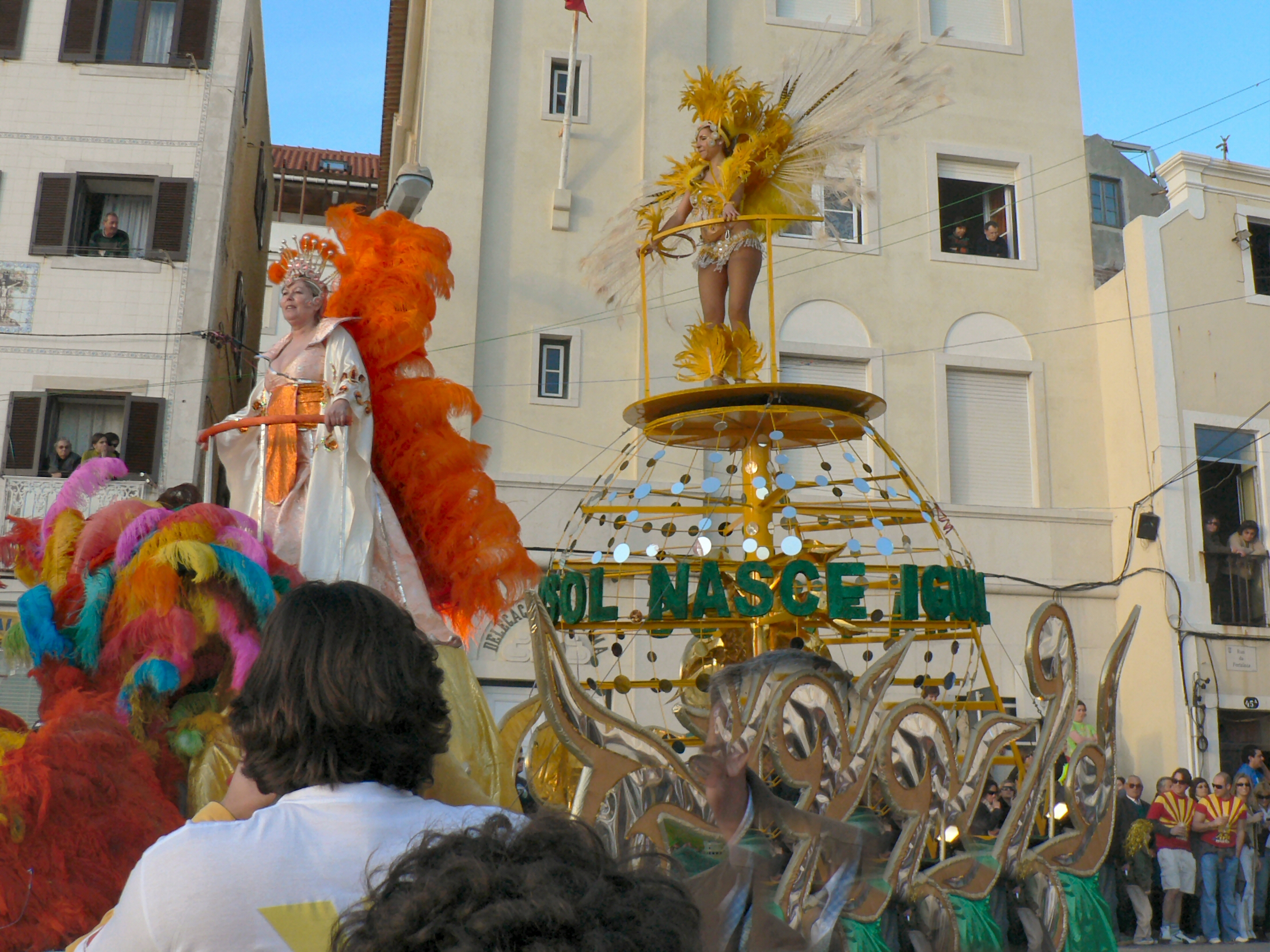 Desfile de Carnaval em Sesimbra 2007